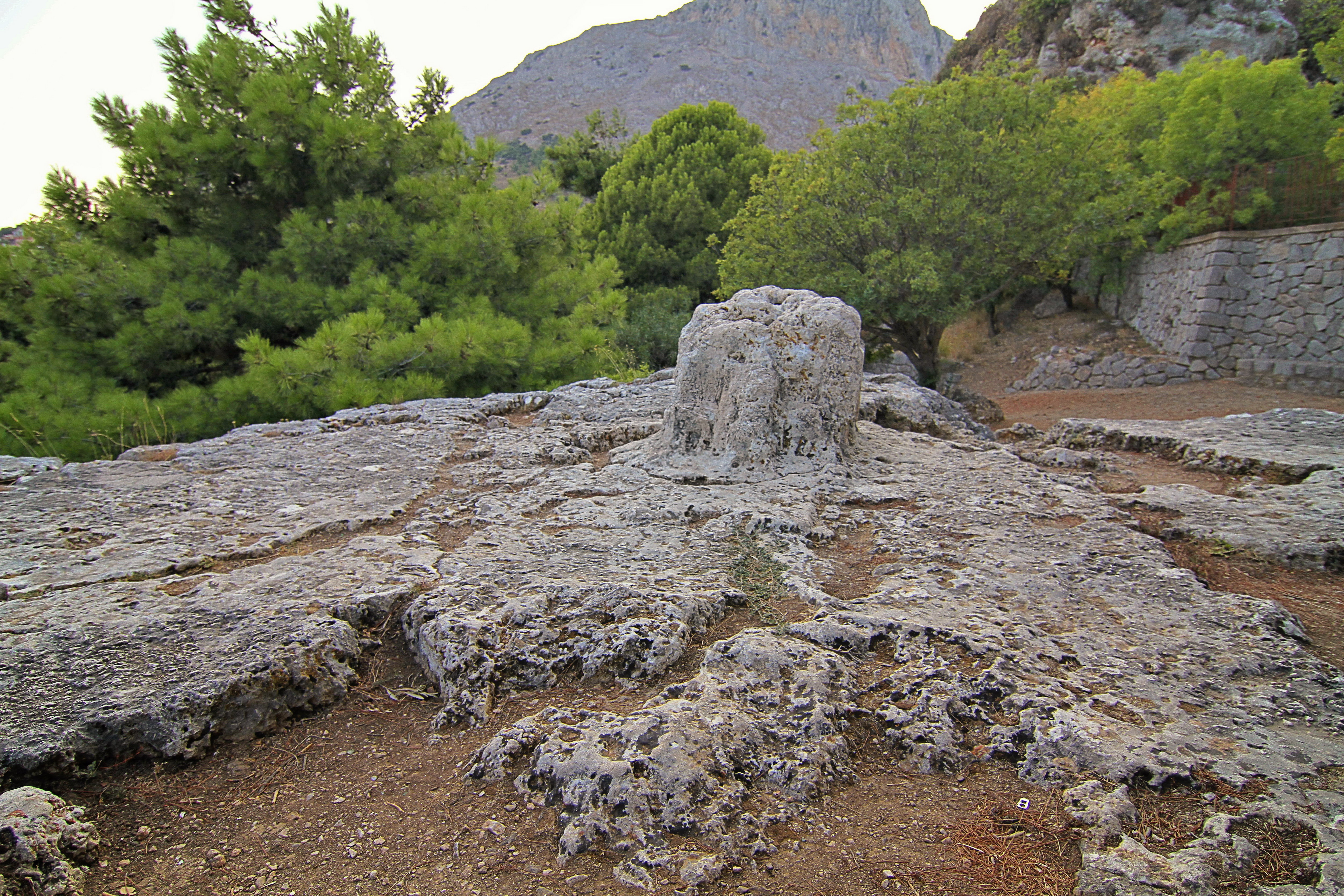 Αρχαιολογικός χώρος Δασκαλόπετρας«Αρχαιολογικός χώρος Δασκαλόπετρας»